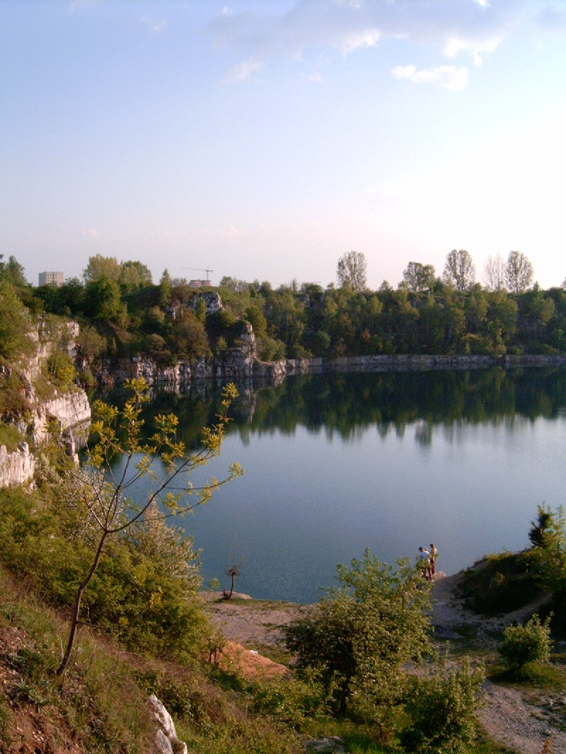 Zakrzówek lake in old limestone quarry